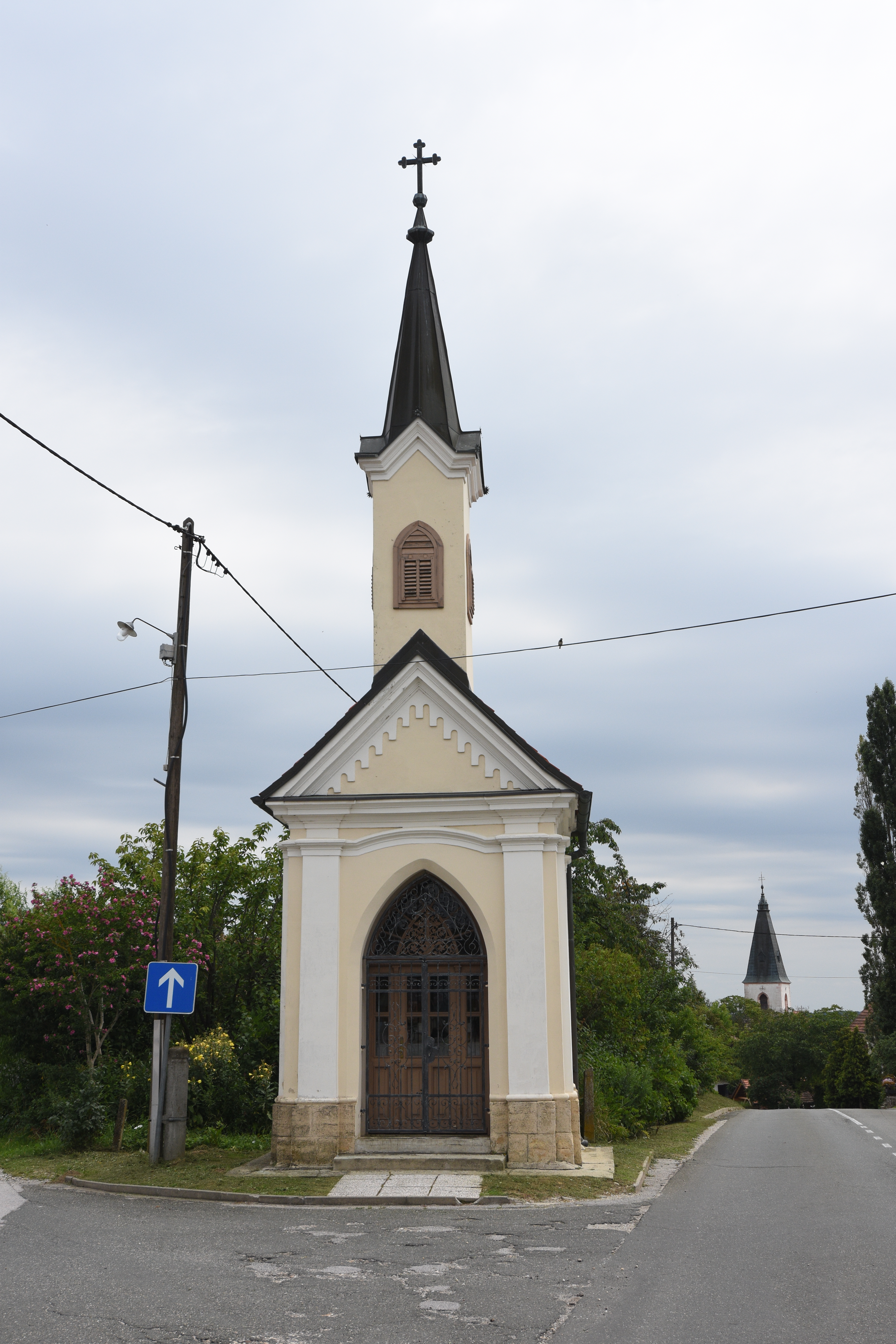 Kapela Sveti Jurij ob Ščavnici